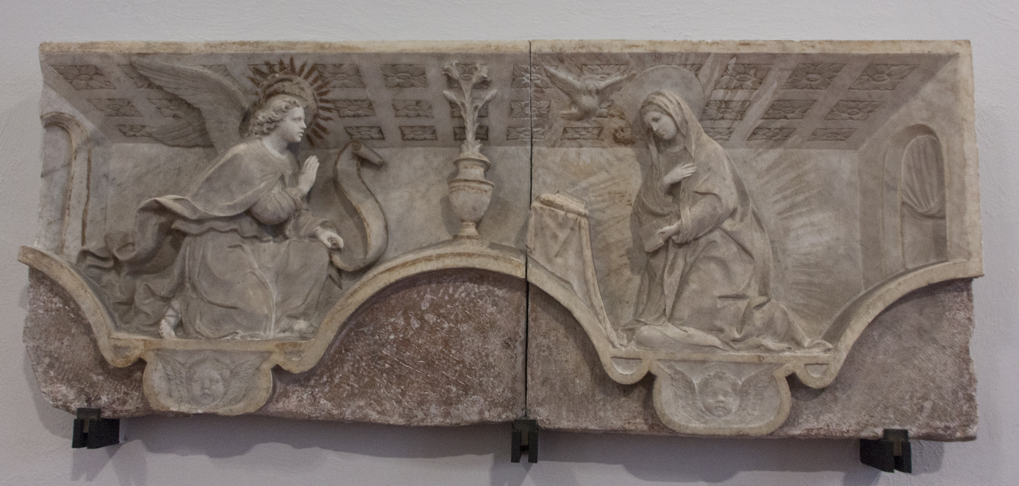 Annunciazione (Antonello Gagini) dalla Chiesa di Santa Cita, Palermo